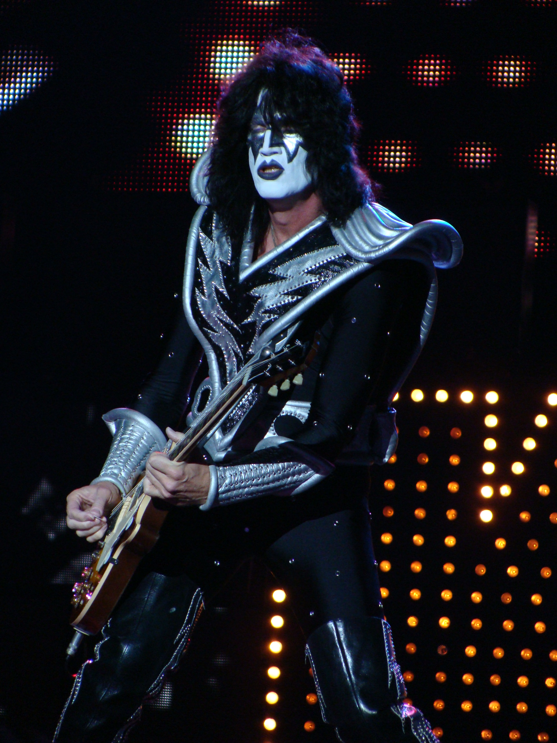 Tommy Thayer, en una actuación del grupo KISS en Vitoria-Gasteiz, en el Azkena Rock Festival.